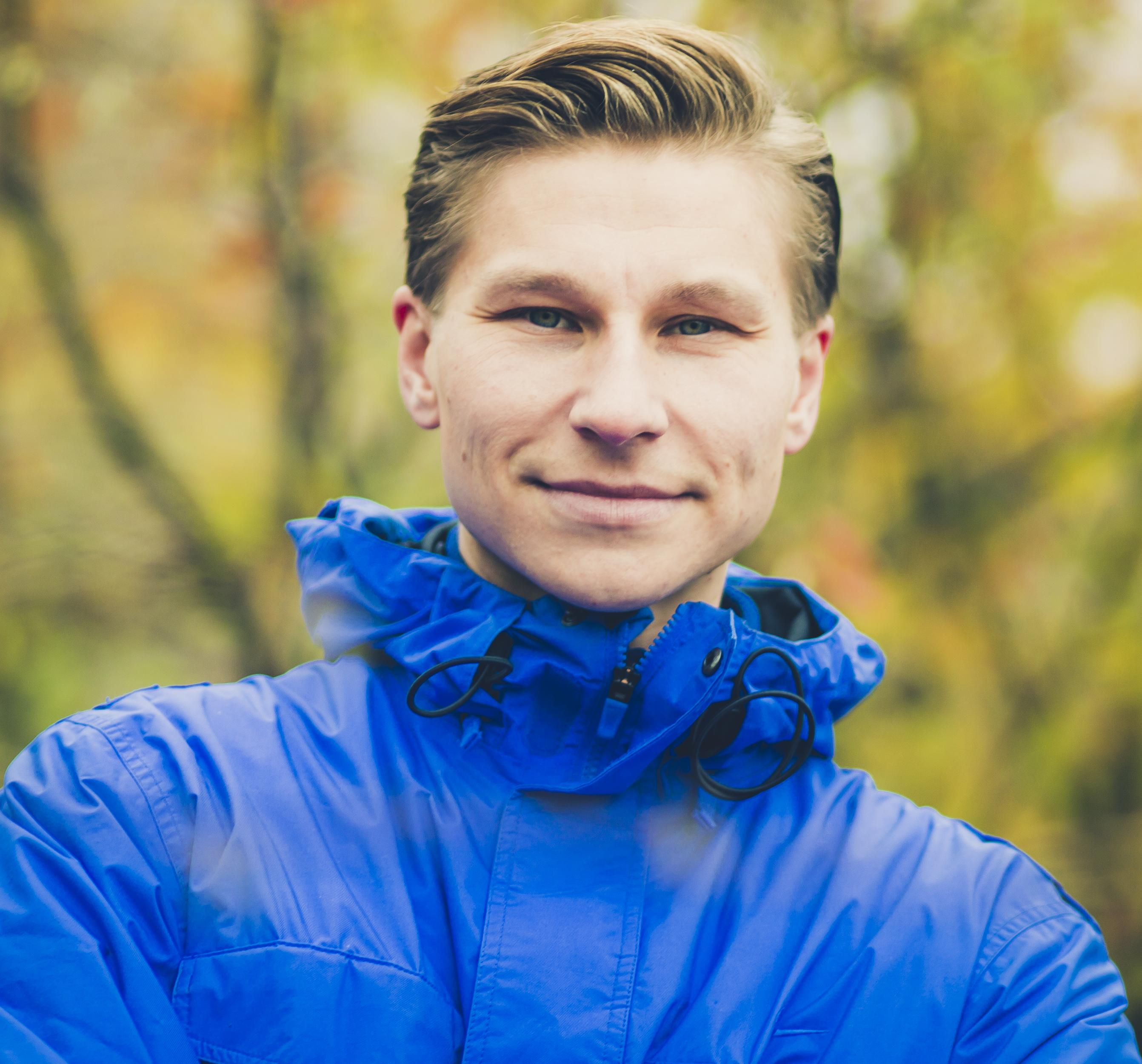 Antti Häkkänen